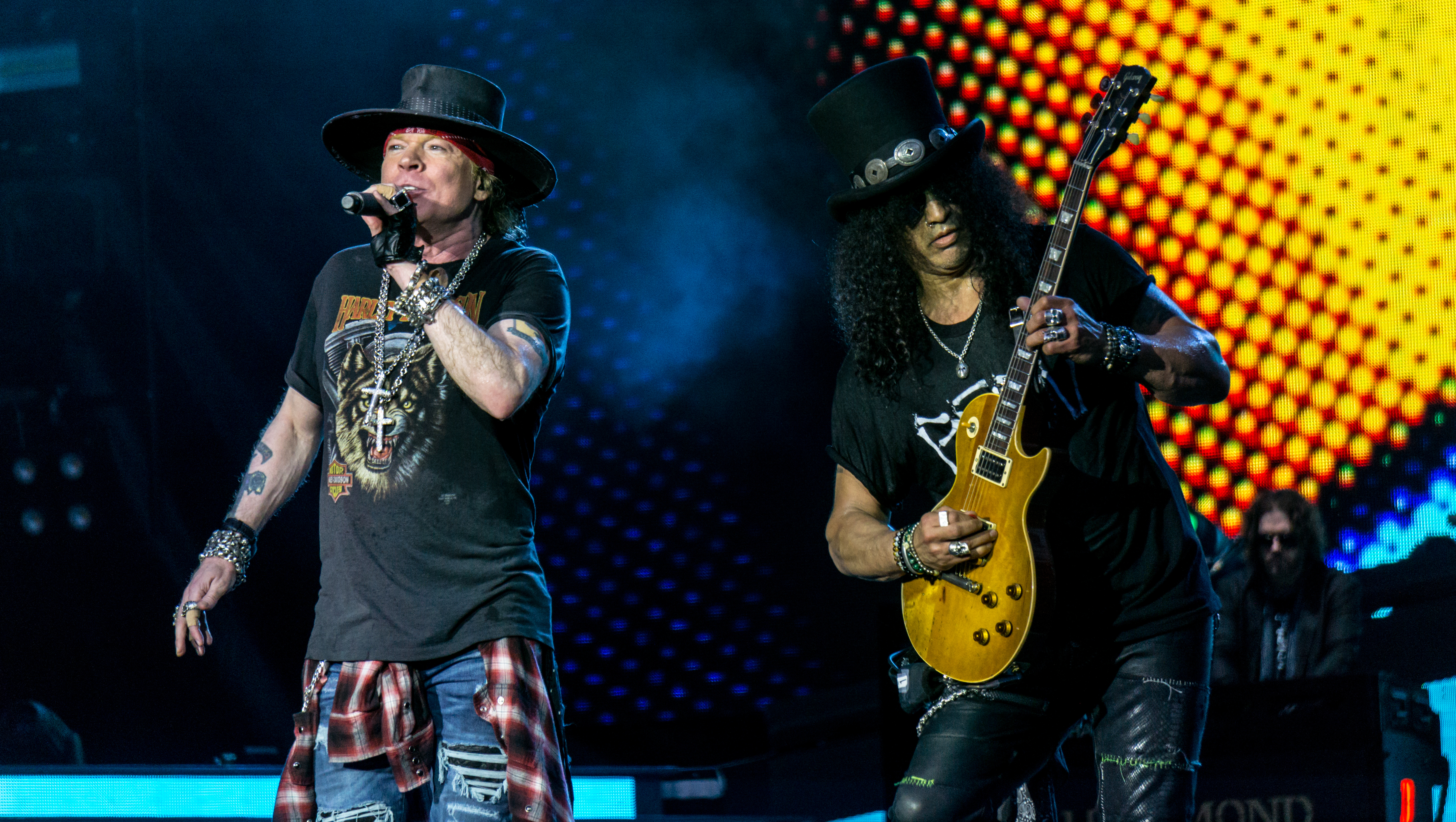 GunsNRoses160617-44